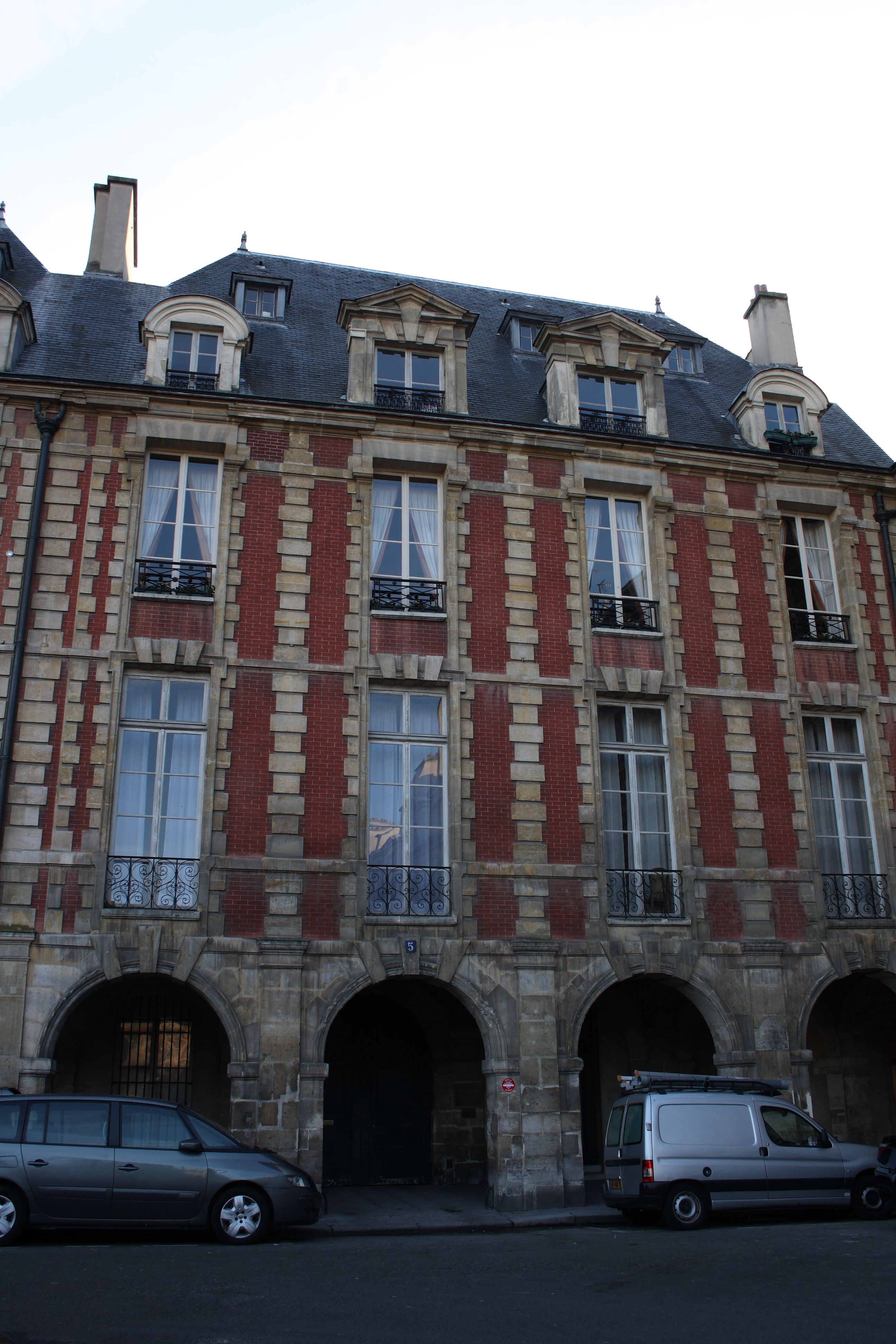 Hôtel de la Salle in Paris, 5 place des Vosges